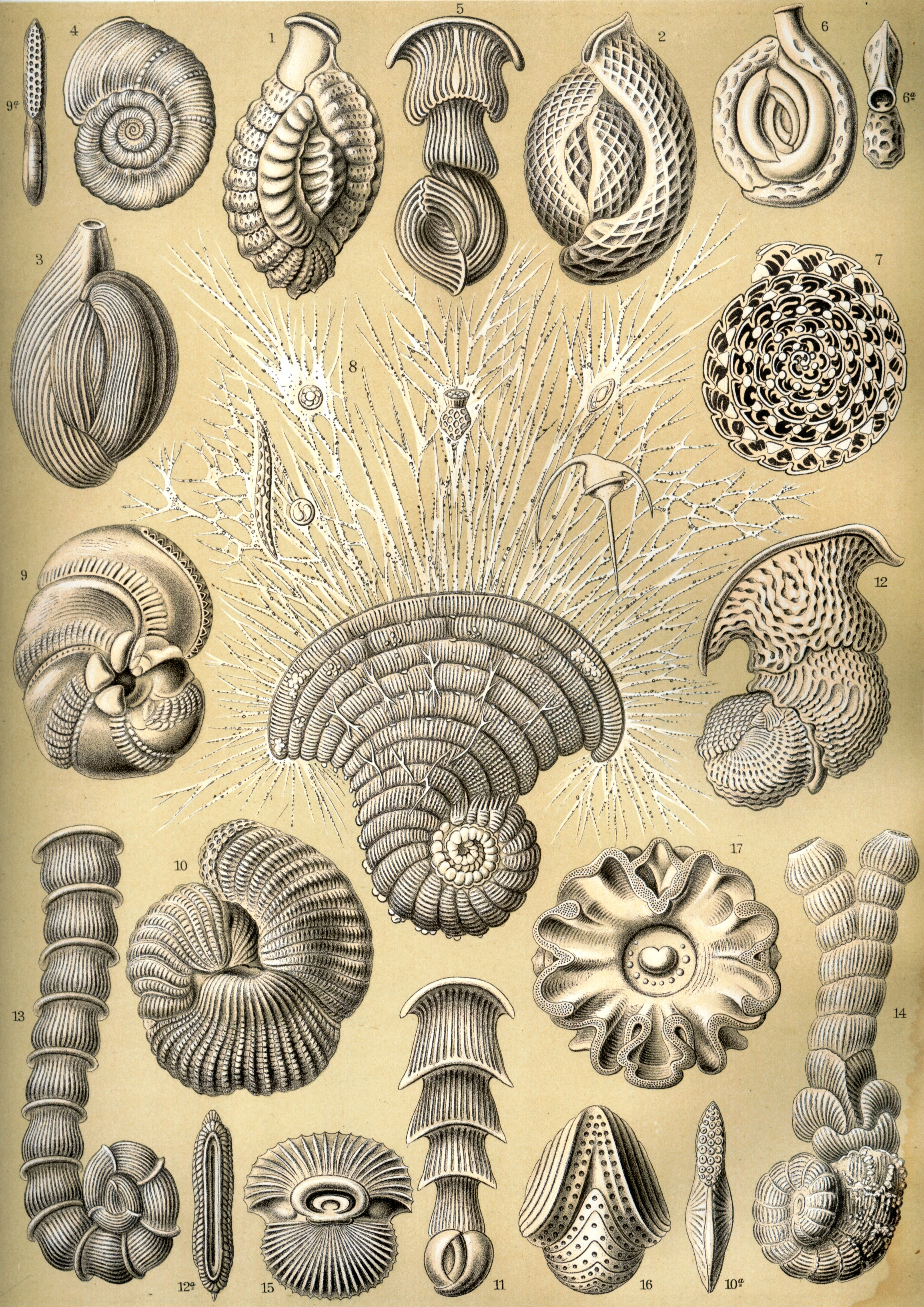 (View full-size image to see the numbers) Miliola parkeri (Brady) = Quinqueloculina parkeri (Brady, 1881), side view Miliola reticulata (Lamarck) = Quinqueloculina sp., side view Miliola striolata (Reuss) Miliolinella fichteliana (d'Orbigny, 1839) / Triloculina fichteliana (d'Orbigny, 1839), side view Cornuspira planorbis (Max Schultze) = Cornuspira planorbis Schultze, 1854, side view Articulina sagra (d'Orbigny) = Articularia sagra (d'Orbigny, 1839), side view Spiroloculina nitida (d'Orbigny) = Spiroloculina nitida d'Orbigny, 1839, side view (6a: view on opening) Alveolina melo (d'Orbigny) = Borelis melo (Fichtel & Moll, 1978), single tube in cross-section Peneroplis planata (Montfort) = Peneroplis planatus (Fichtel & Moll, 1798), side view with pseudopods Hauerina circinata (Brady) = Hauerina circinata Brady, 1881 / Polysegmentina circinata (Brady, 1881), side view (9a: view on opening) Hauerina ornatissima (Kärrer) = Hauerina ornatissima (Kärrer, 1868), side view (10a: view on opening) Vertebralina mucronata (d'Orbigny) = Articulina mucronata (d'Orbigny, 1839), side view Vertebralina insignis (Brady) = Vertebralina insignis Brady, 1884, side view (12a: view on opening) Vertebralina catena (Haeckel) = Miliolina sp.?, side view Vertebralina furcata (Haeckel) = Miliolina sp.?, side view Biloculina comata (Brady) = Pyrgo comata (Brady, 1884), top view Orbiculina adunca (Lamarck) = Archaias angulatus (Fichtel & Moll, 1803), side view Orbitolites laciniata (Brady) = Marginopora vertebralis var. laciniata (Dana, 1848), top view